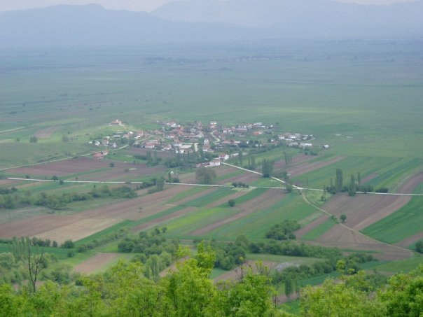 Село Подвис